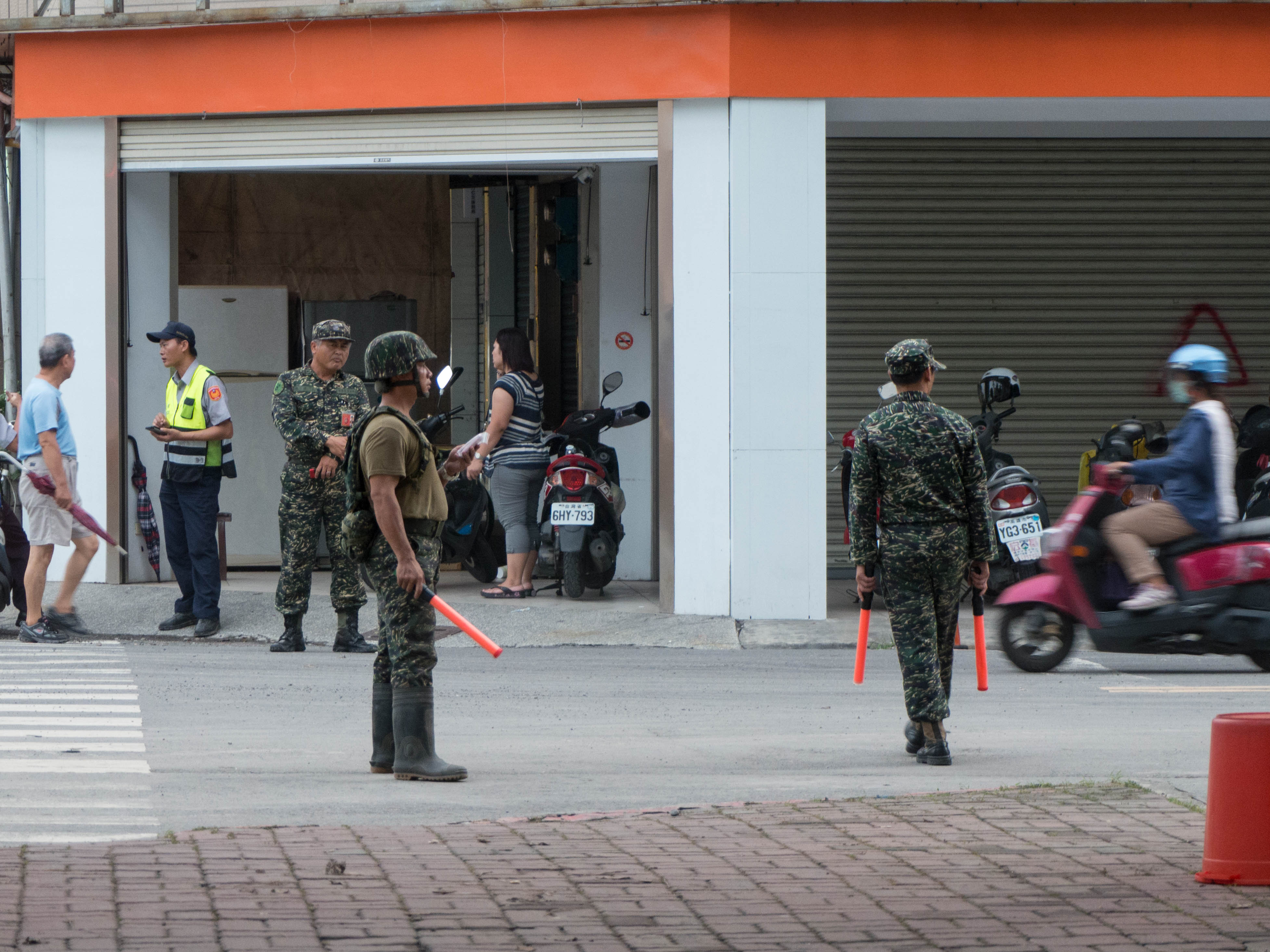 中文（台灣）: 高雄市苓雅區福德三路與三多二路路口，指揮交通的海軍陸戰隊隊員與高雄市政府警察局警察。